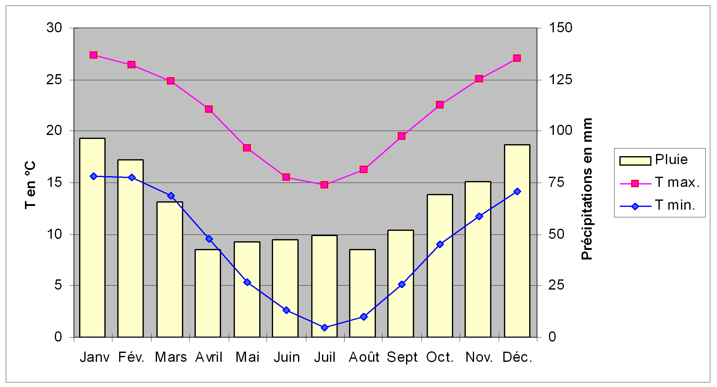 Diagramme climatique de la ville de Stanthorpe (Australie), comprenant deux courbes, représentant les températures maximales et minimales, et un histogramme, représentant la pluviométrie, pour les douze mois de l'année.